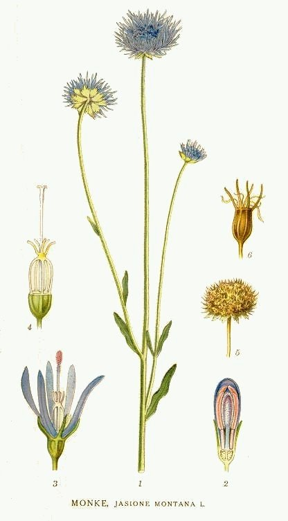 Original Description Monke, Jasione montana L.